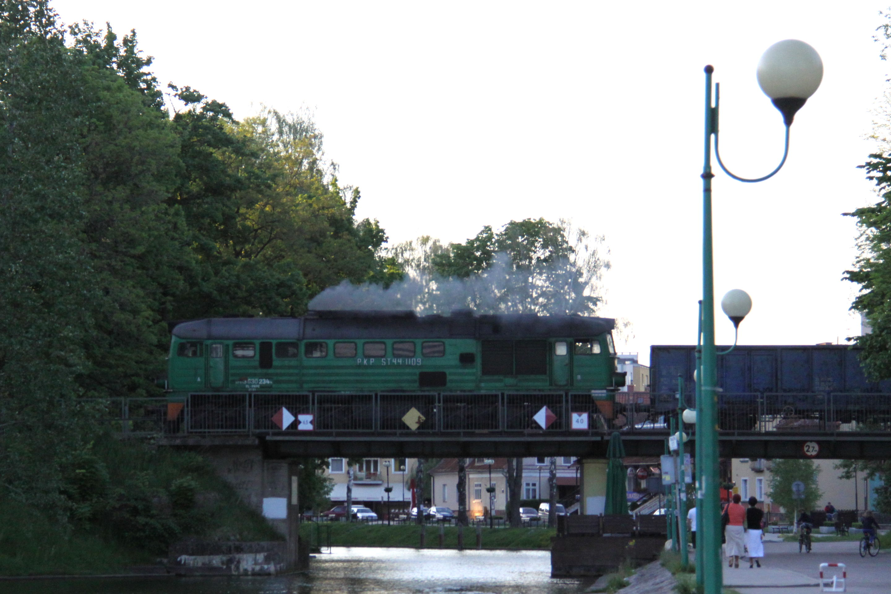 Eisenbahnbrücke Lötzen (Giżycko)